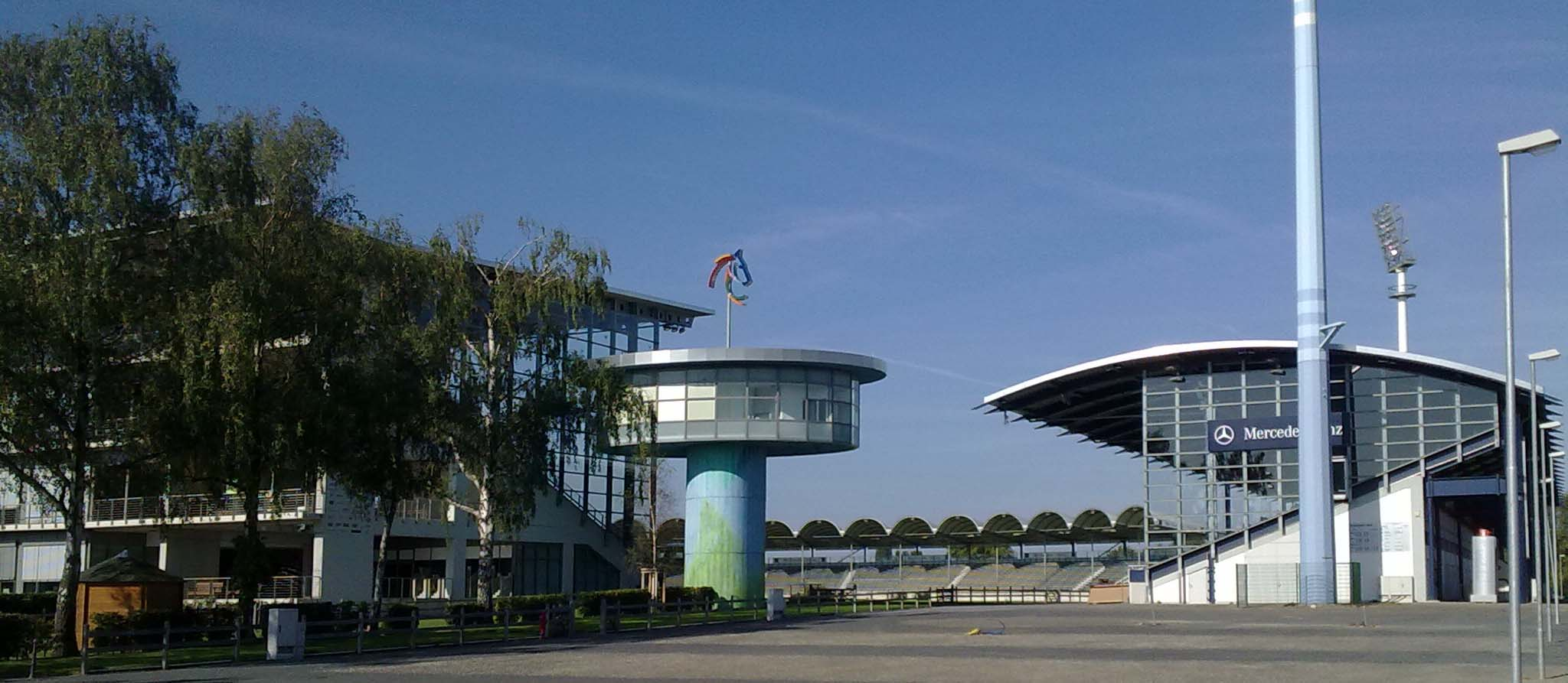 Hauptstadion Aachen - Ausrichtungsort der Springreitwettbewerbe des CHIO Aachen